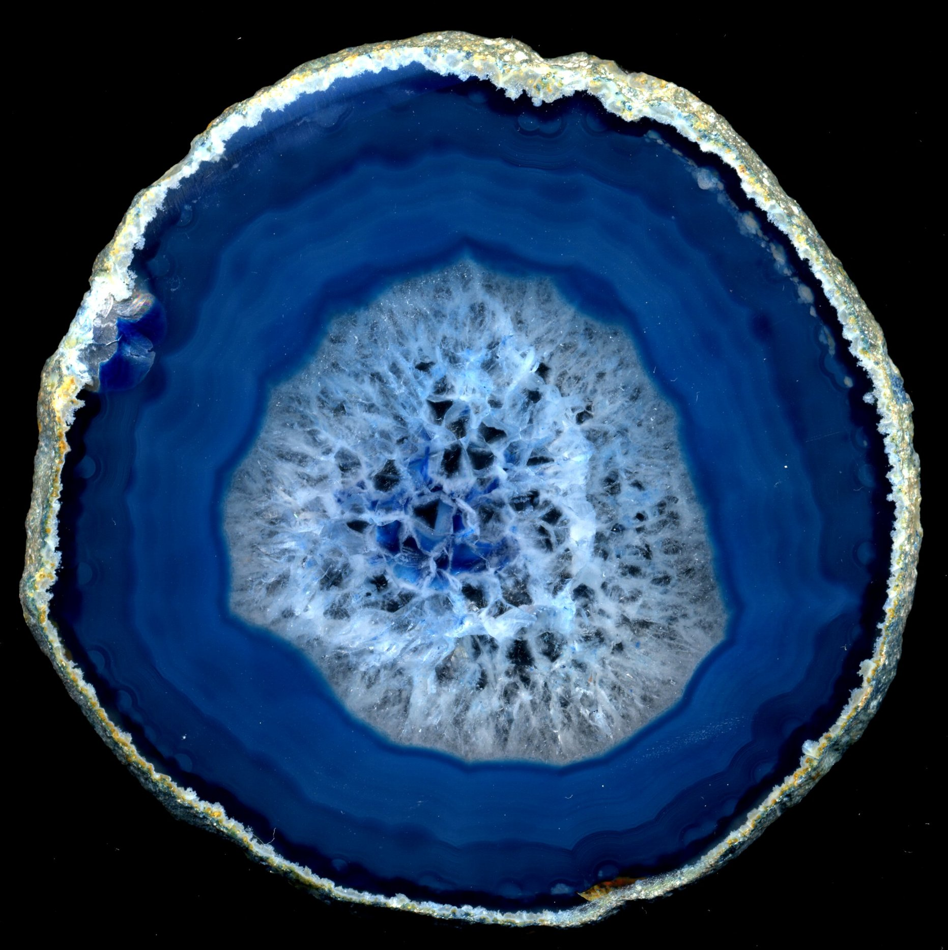 Agate